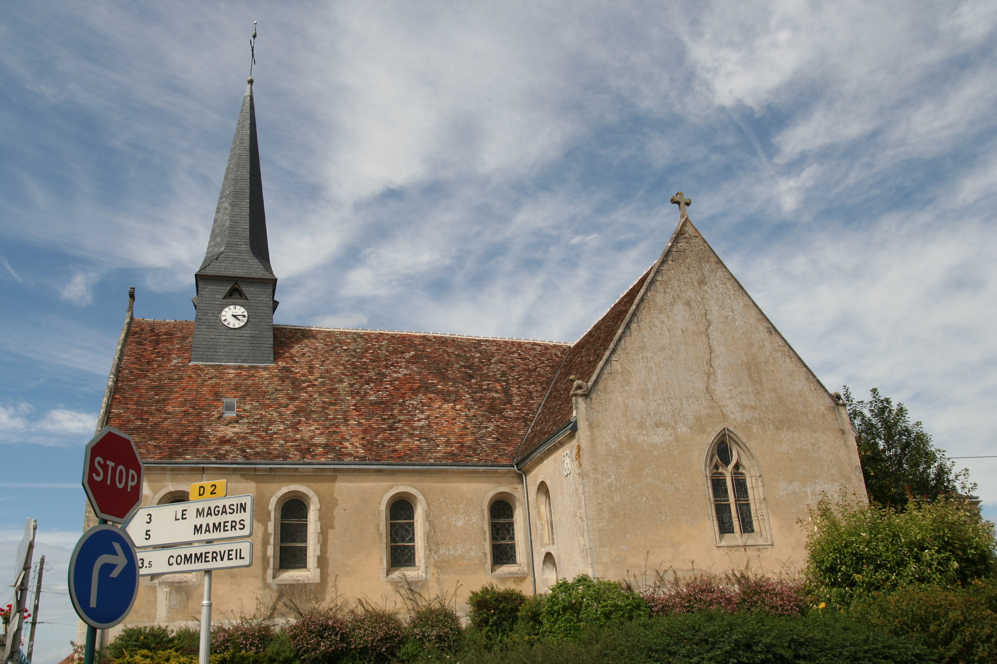 L'église de Saint-Rémy-des-Monts.